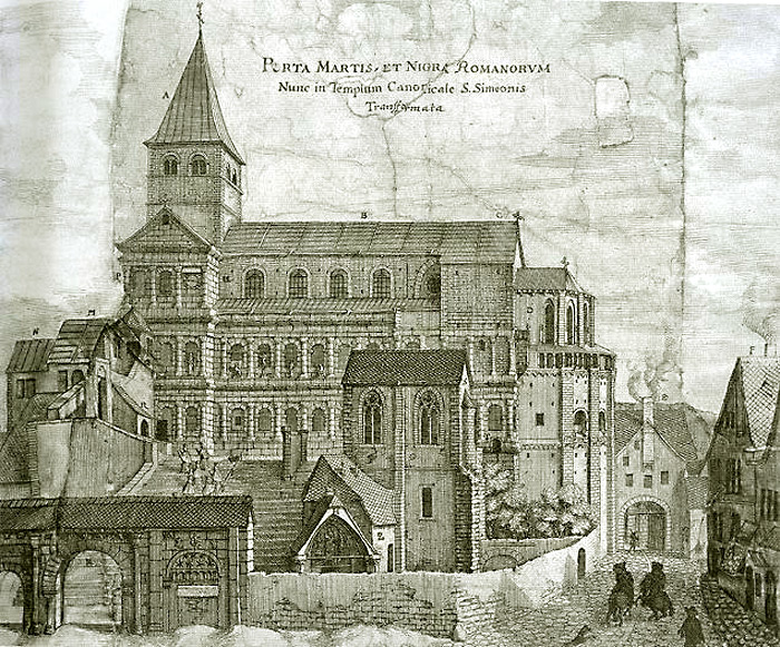 St. Simeon in Porta Nigra (aka Porta Martis) in Trier, engraving from 1670